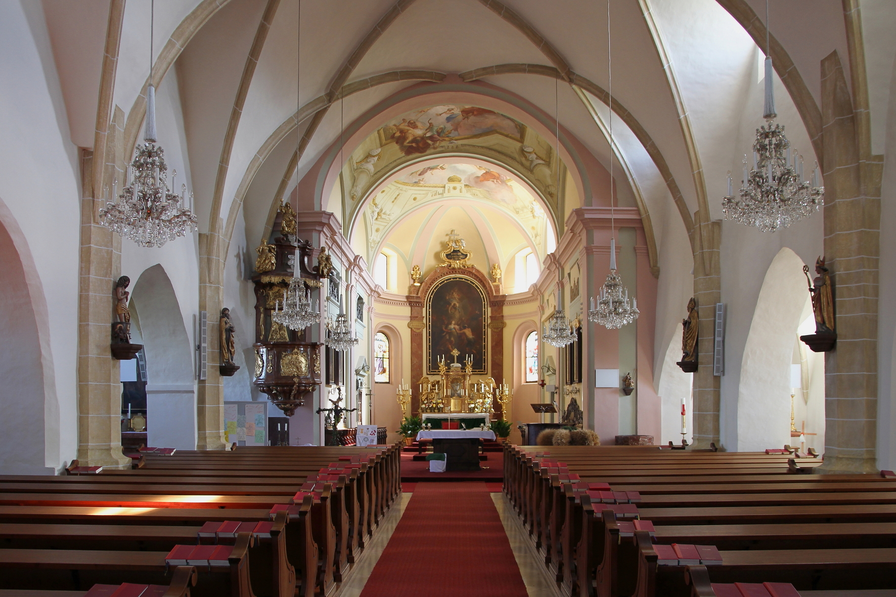 Innenansicht der katholischen Pfarrkirche hl. Agatha in der niederösterreichischen Gemeinde Hausleiten.